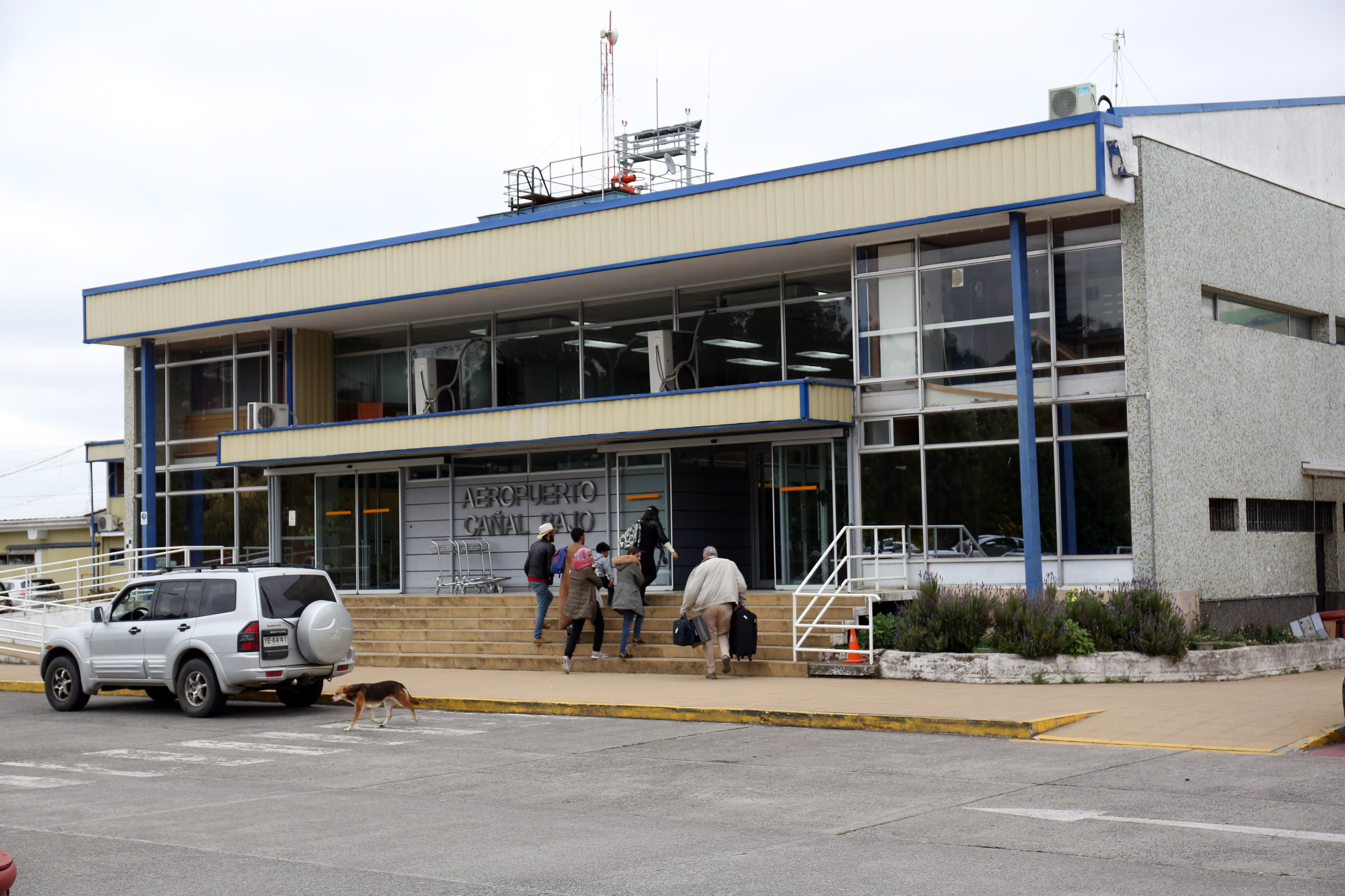 Aeropuerto Cañal Bajo Carlos Hott Siebert, de Osorno.